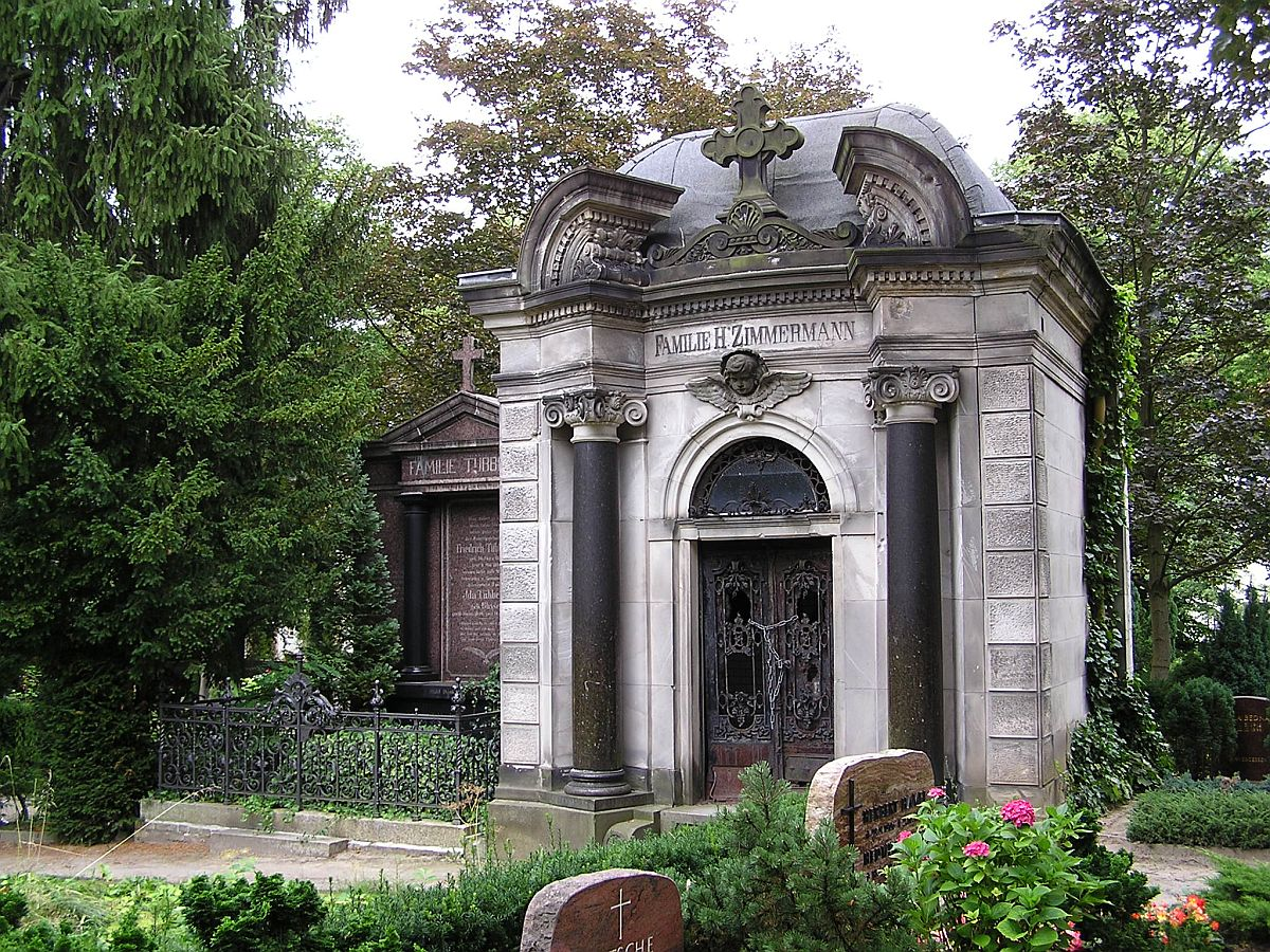 Friedhof Schmargendorf in Berlin; Mausoleom Zimmermann